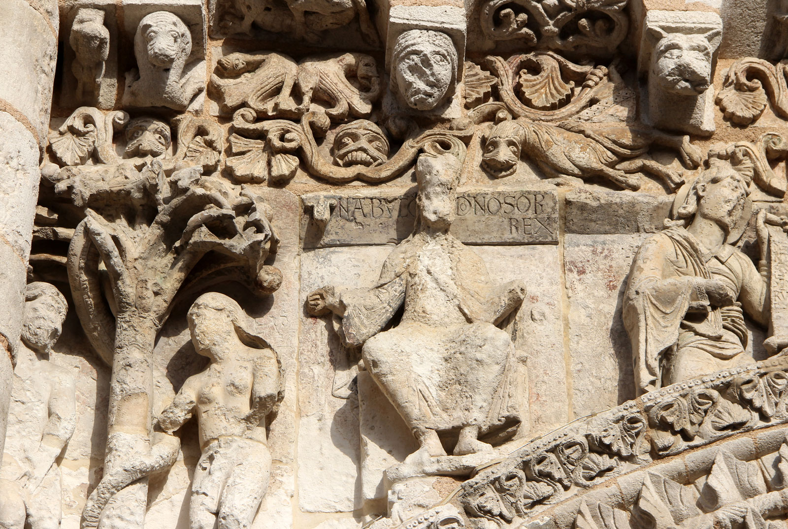 Nabuchodonosor. Façade ouest de l'église Notre-Dame La Grande. Poitiers. Unknown nabuchodonosor. west front of notre-dame la grande. poitiers.